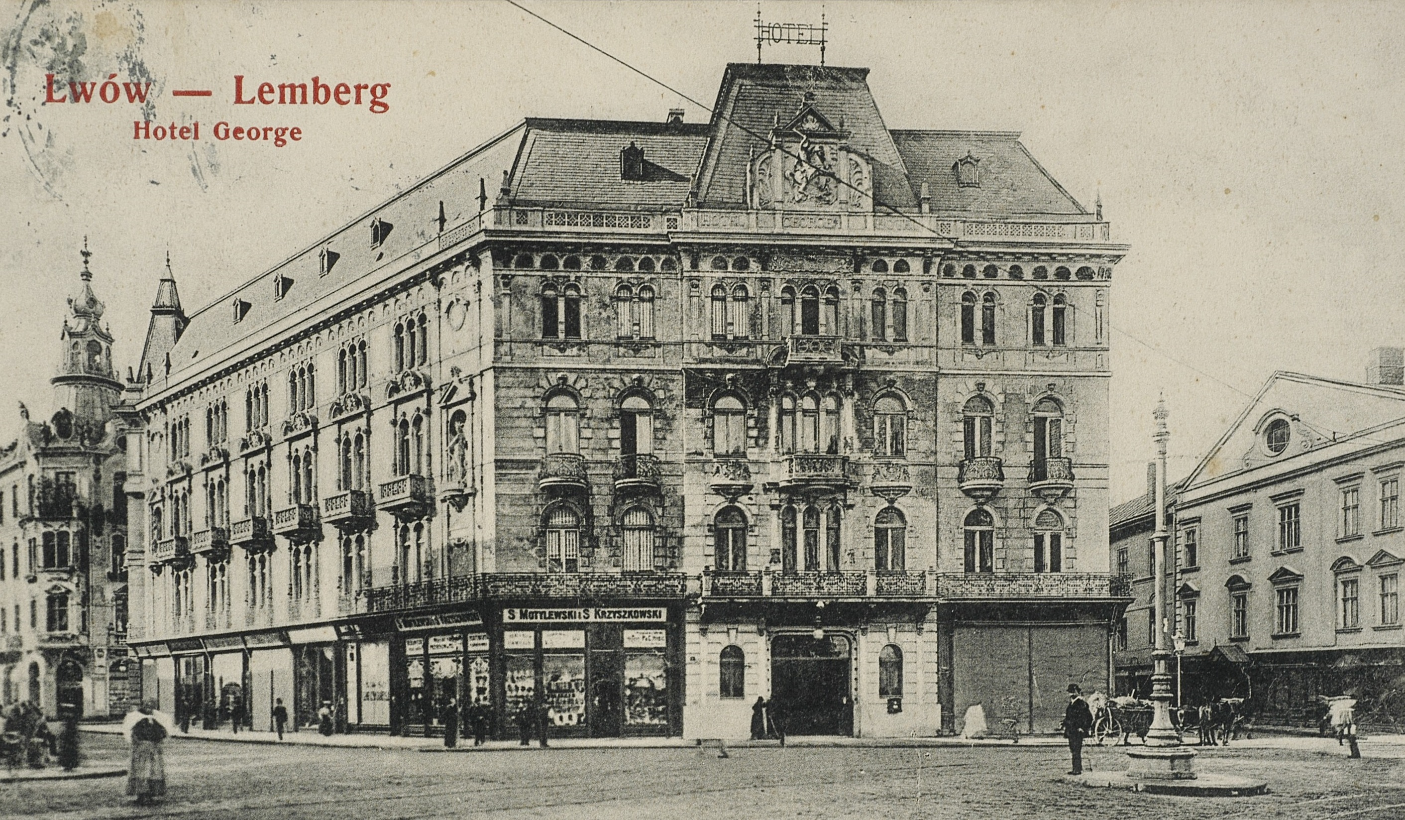 пл.Міцкевича